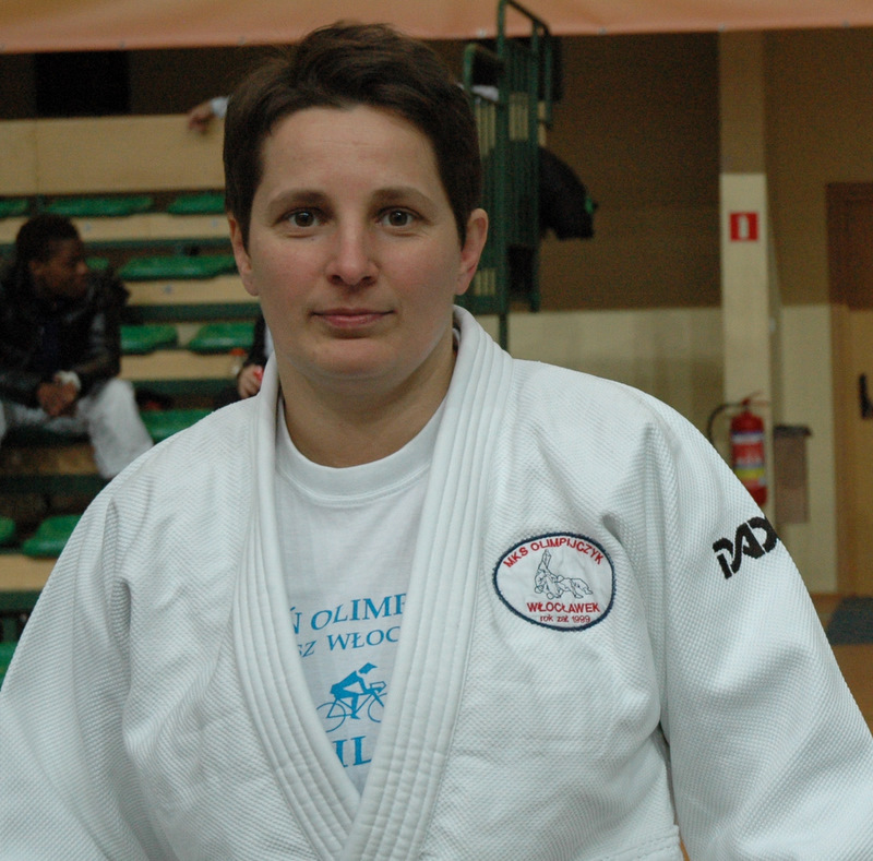 Aneta Szczepańska podczas Treningu z Mistrzem na Pucharze Świata w Judo - Warszawa 25 luty 2012